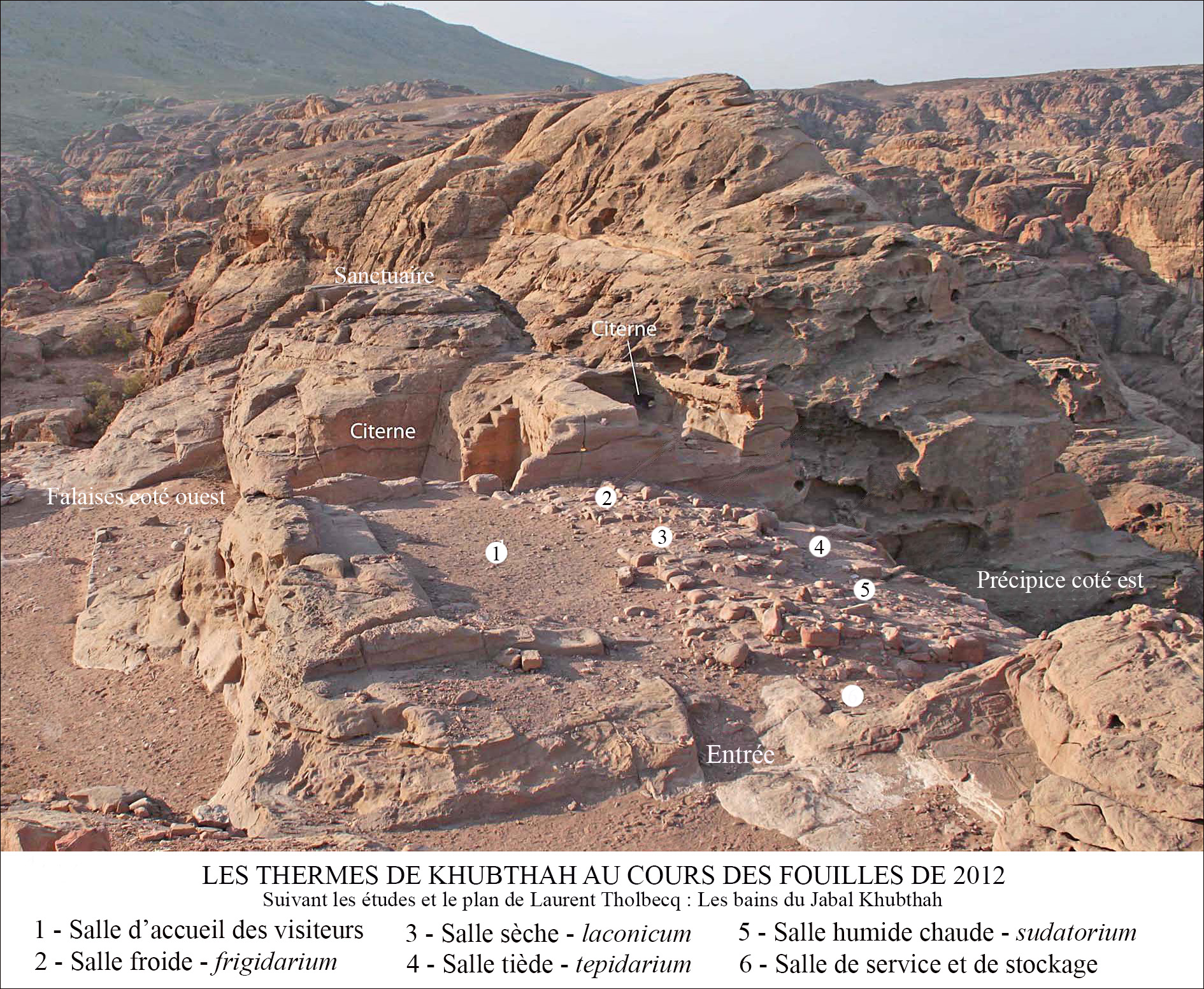 Les thermes de Khubthah au cours des fouilles de 2012, par l'archéologue Laurent Tholbecq et son équipe.